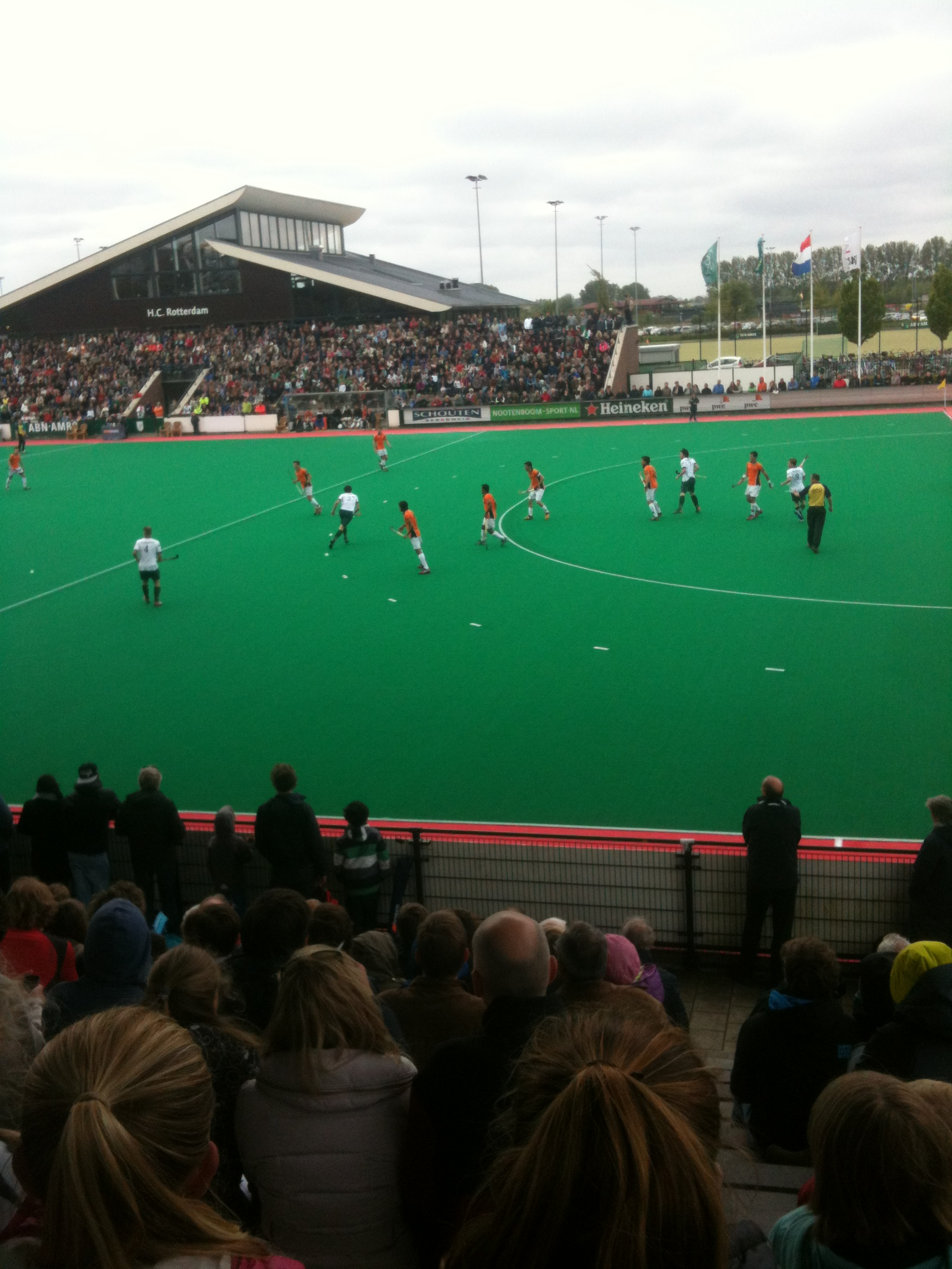 Eerste wedstrijd finale play offs tussen Rotterdam en Oranje Zwart Hazelaarweg 25-05-2013